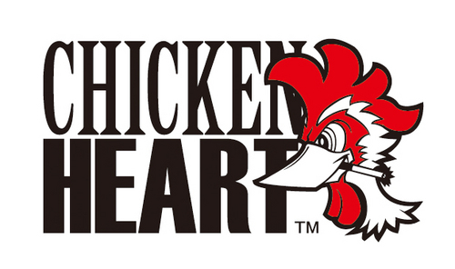 チキンハートロゴ